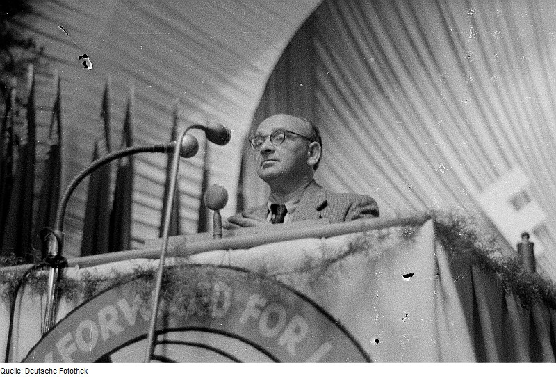 Original image description from the Deutsche Fotothek Gerhart Eisler als Redner